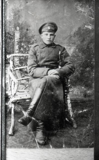 Gustav Jõgi, Eesti sõjaväelane ja Saaremaa mässu üks juhte